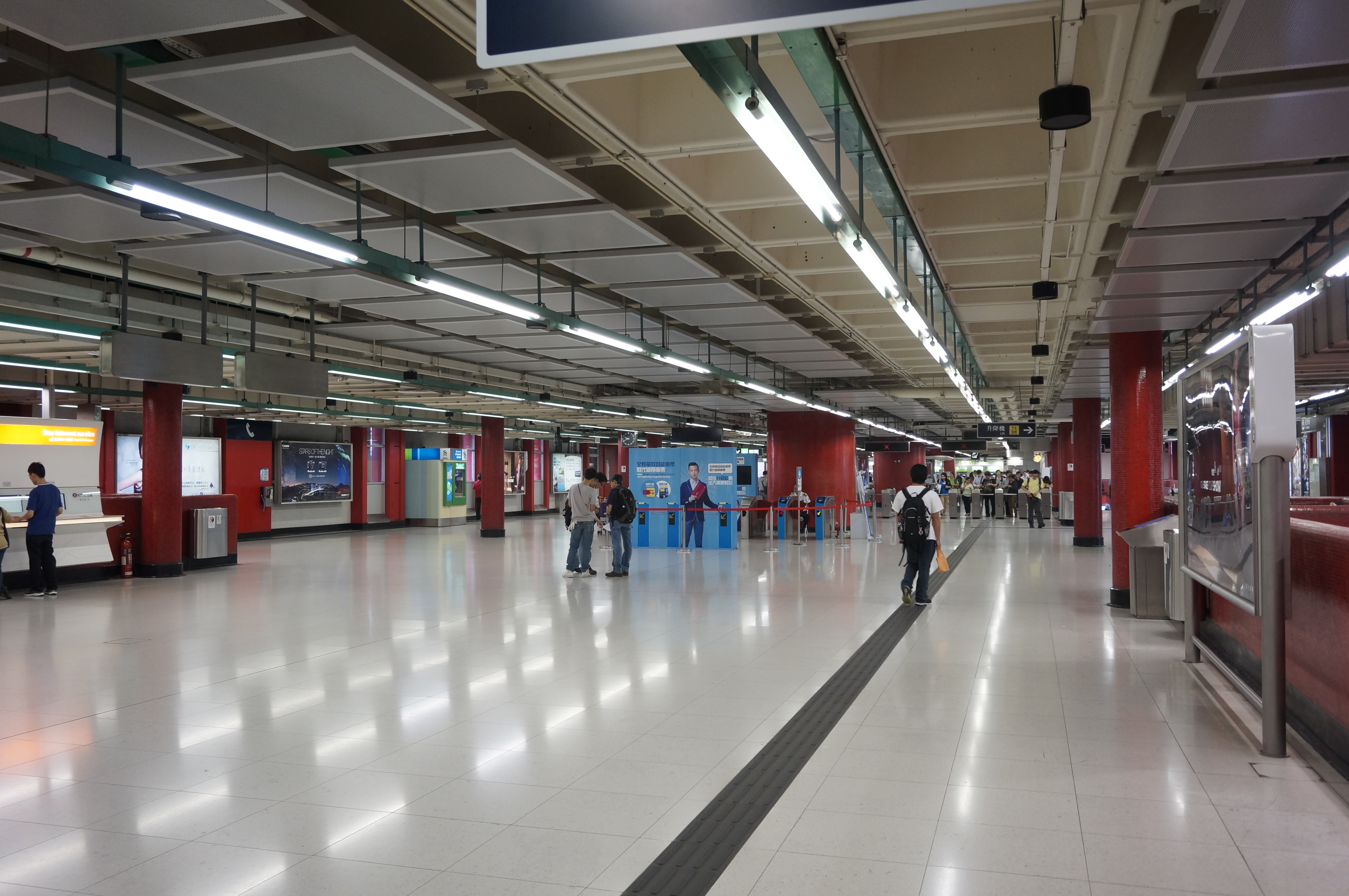 港鐵荃灣站大堂